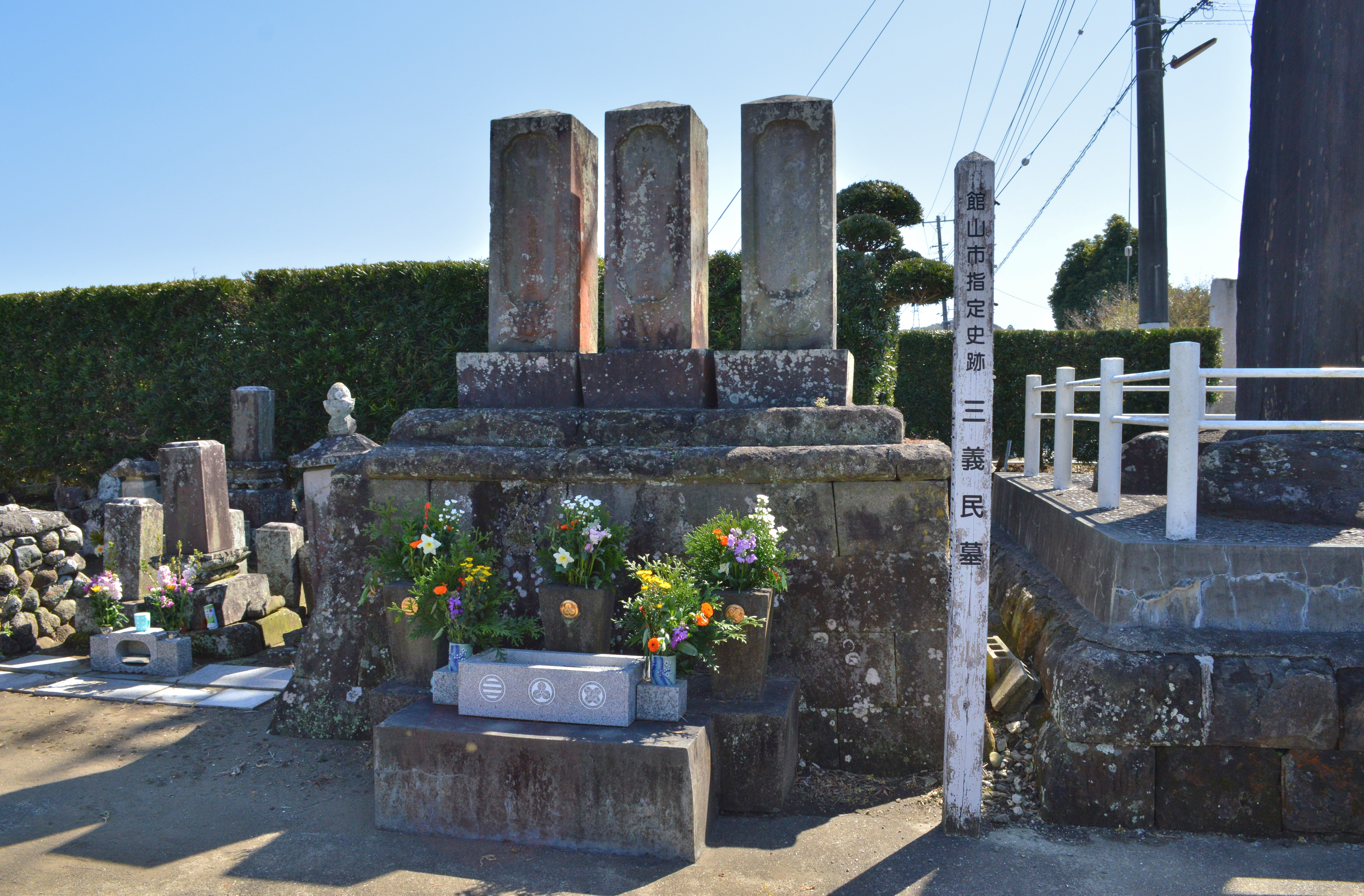 安房国分寺 義民碑 三義民墓